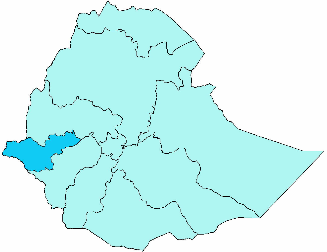 Mappa del vicariato apostolico di Gambella. Fonte per i confini della diocesi: Ethiopian Catholic Church.